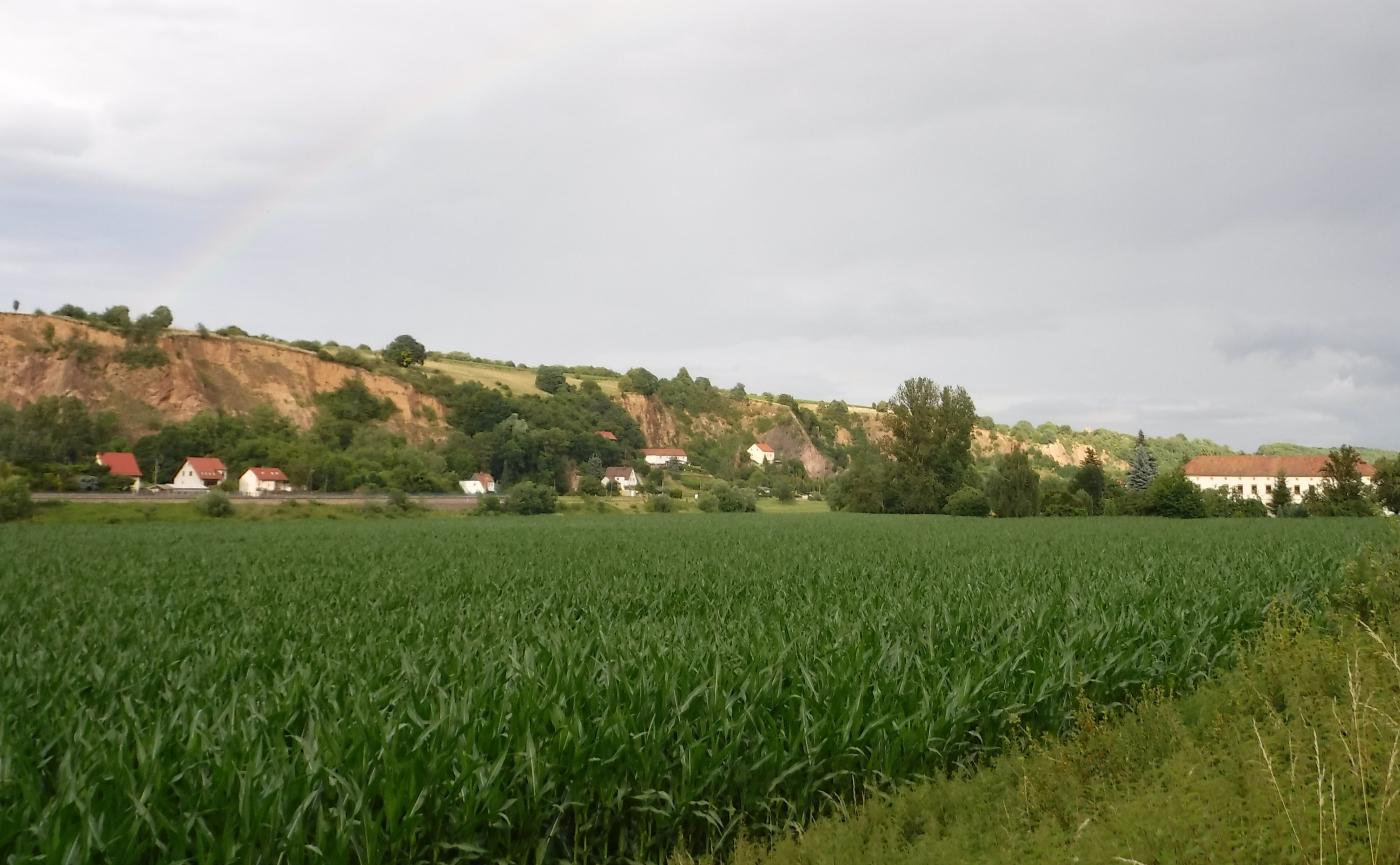 Einzelgebiet 5 "Elbhänge bei Karpfenschänke" des Fauna-Flora-Habitat-Gebiets "Bosel und Elbhänge nördlich Meißen", Blick aus Keilbusch, 01665 Diera-Zehren